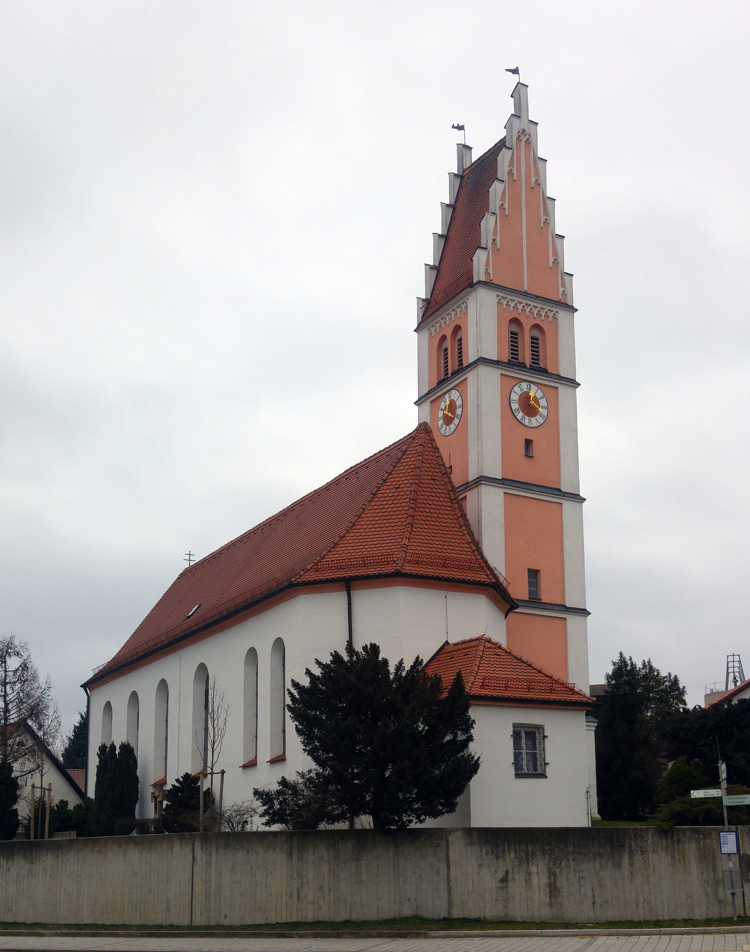 Baudenkmal in Igenhausen, Aktennummer D-7-71-140-5